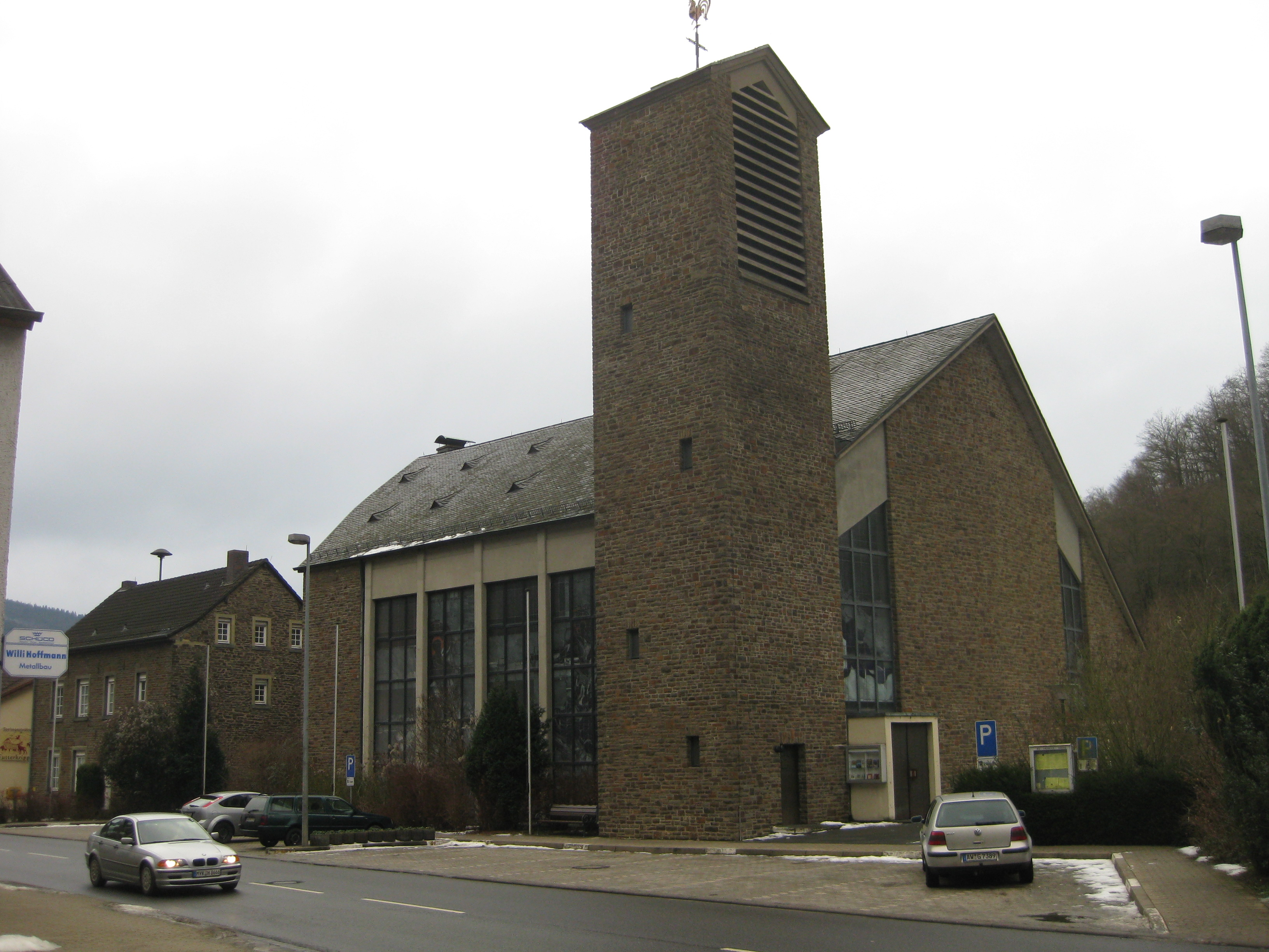 St. Andreaskirche